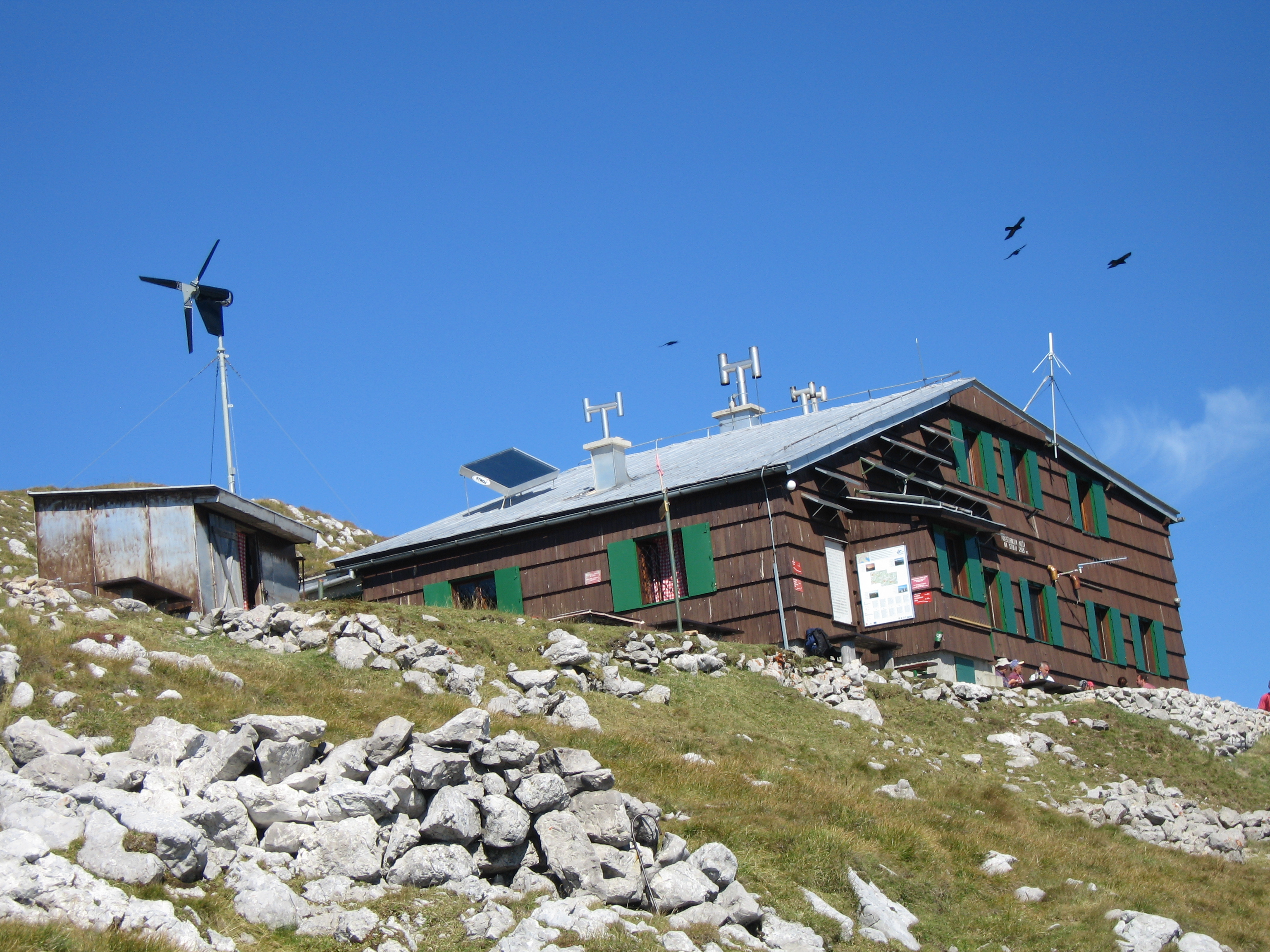 Presernova koča na Stolu